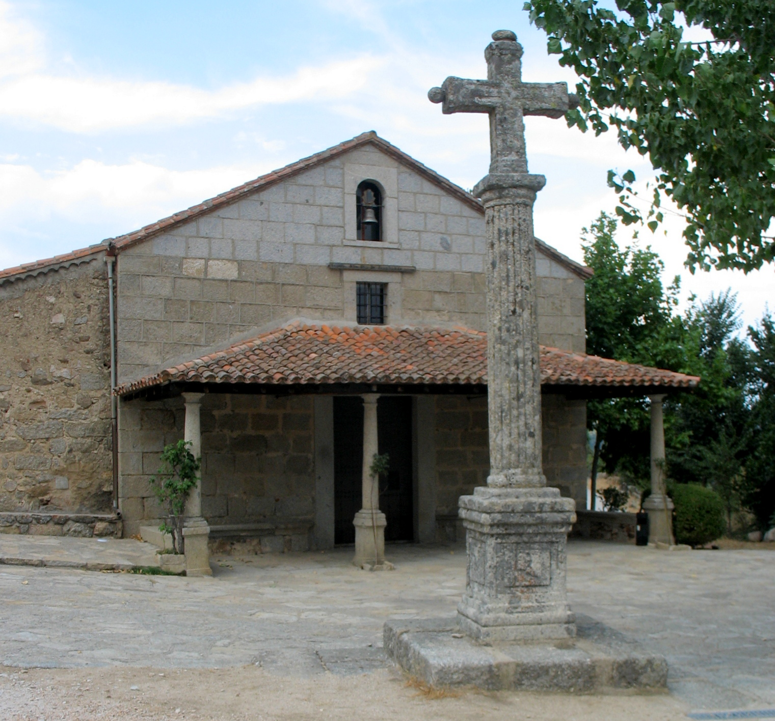 Ermita de Navahonda (Robledo de Chavela, Comunidad de Madrid, España). En primer plano Cruz del Humilladero (estilo barroco).